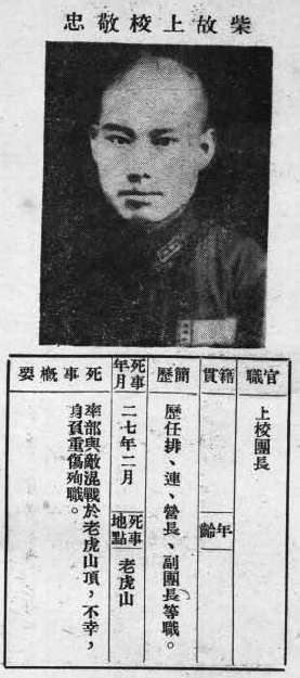 中文（台灣）: 抗戰軍人忠烈錄第一輯中的烈士遺像